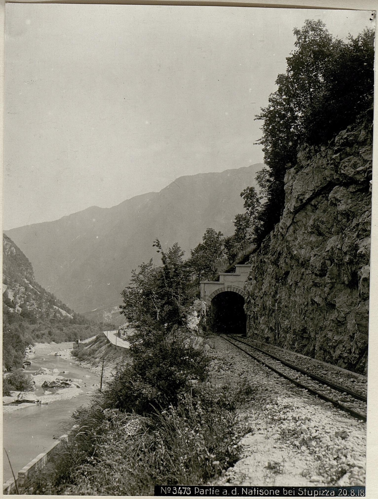 Partie am Natisone bei Stupizza